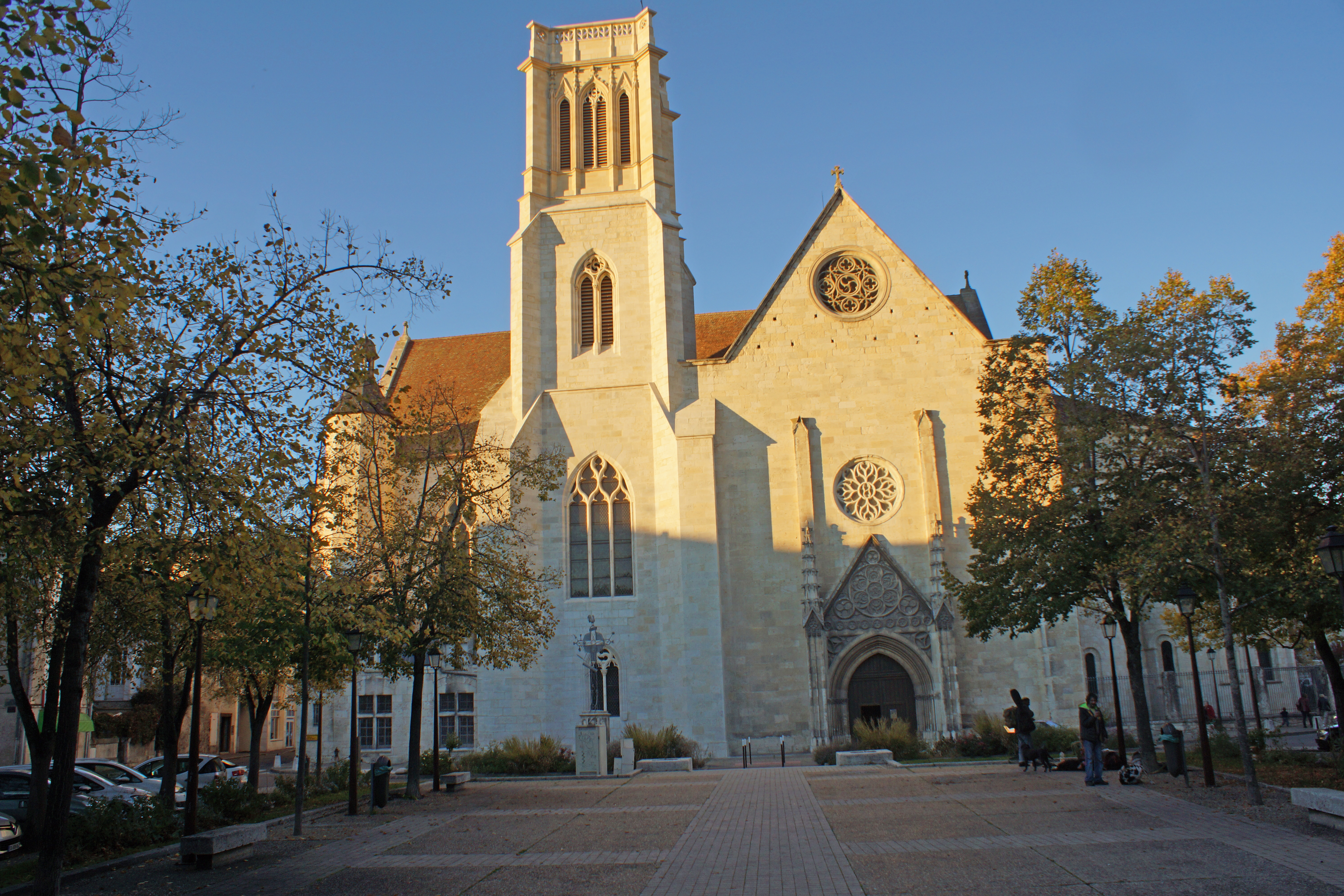 Cathédrale Saint-Caprais d'Agen